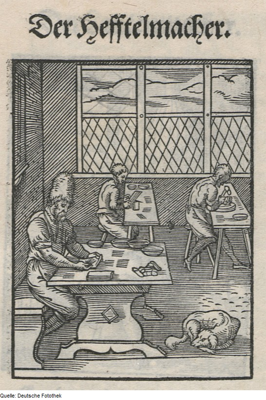 Original image description from the Deutsche Fotothek Ständebuch & Handwerk & Heftelmacher & Heftler